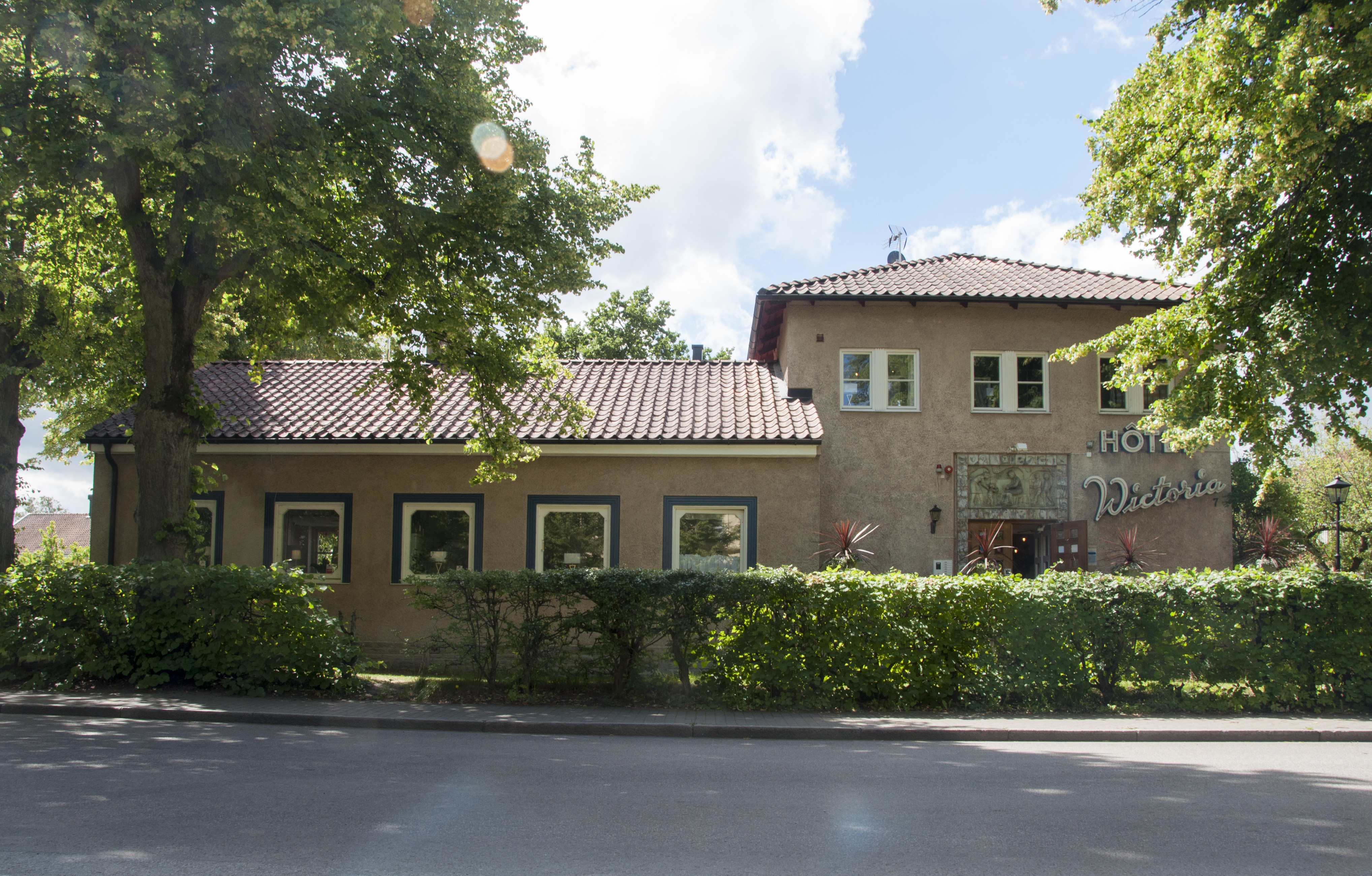 Hôtel Wictoria, ursprungligen Grevillihemmet (pauvres honteux för äldre ogifta kvinnor). Byggnadsår 1949. Arkitekt Edgar Haasum. Ovanför ingången syns keramisk relief av den Mariestads födde formgivaren Carl-Harry Stålhane.